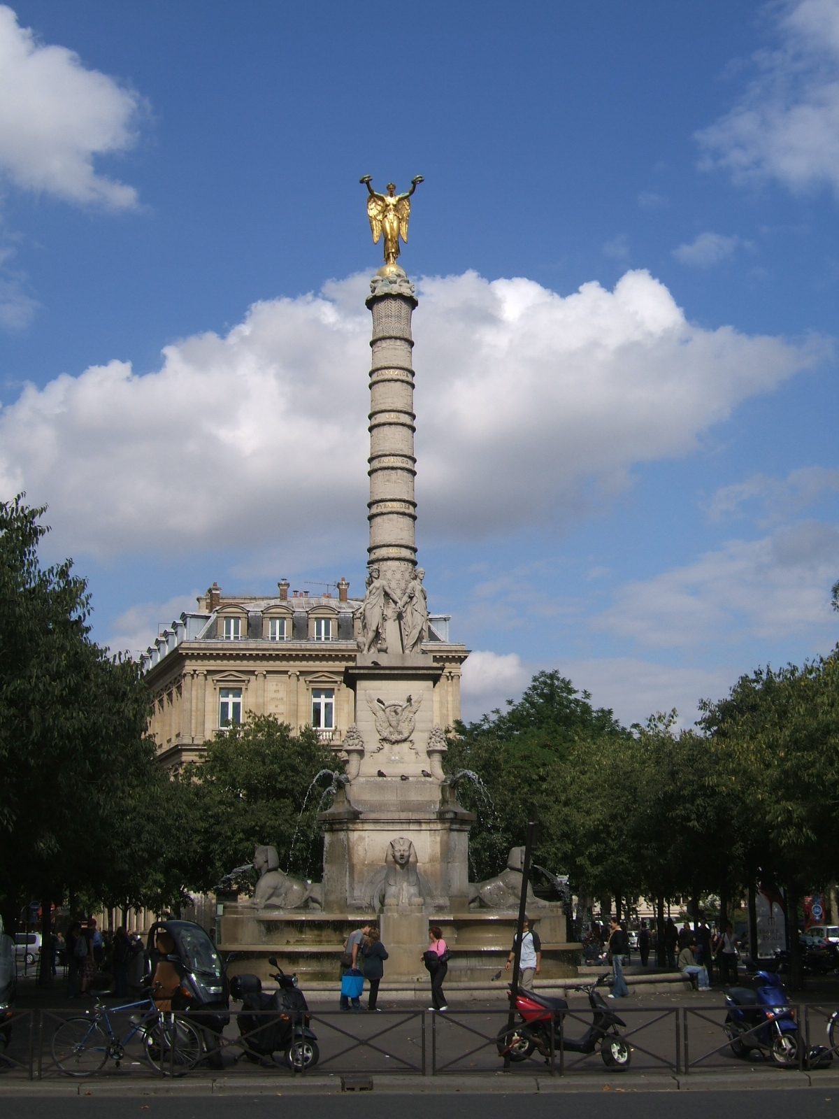 Fontaine du Palmier (Paris, France)